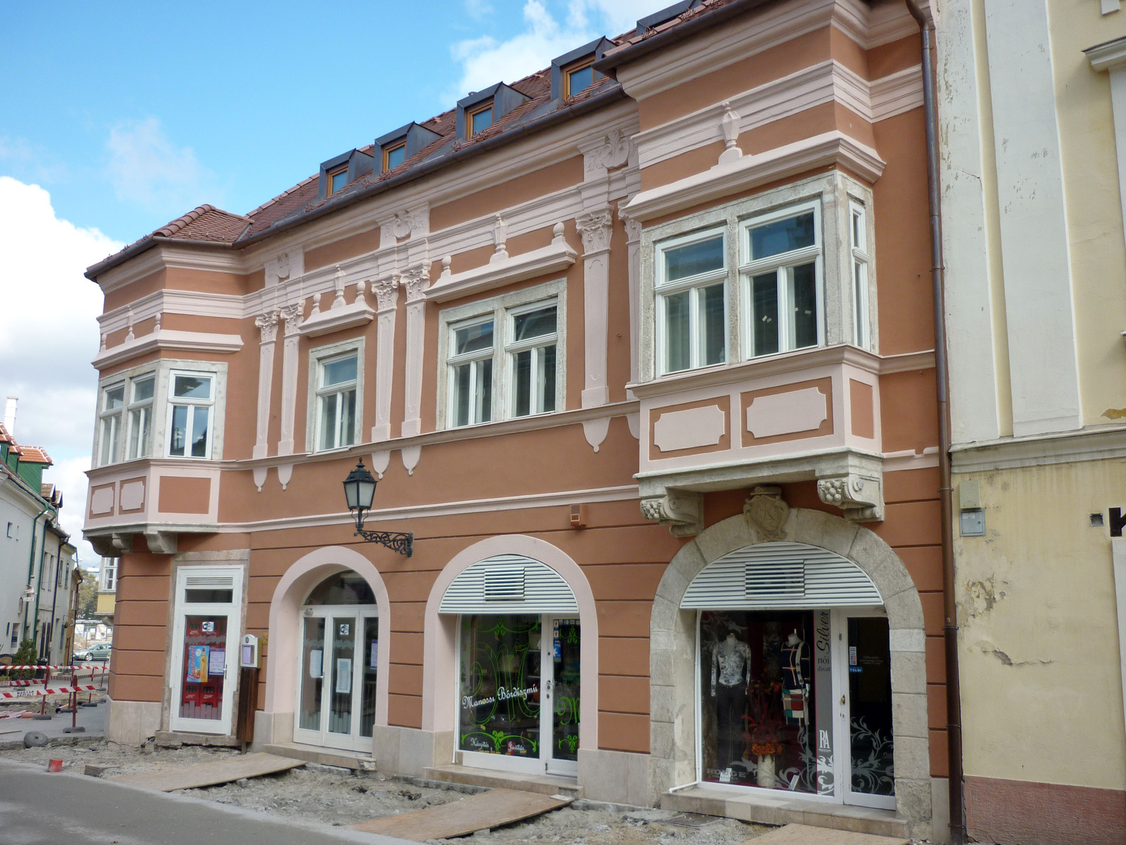 Lakóház (Győr, Jedlik Ányos utca 9., Kenyér köz 4.)